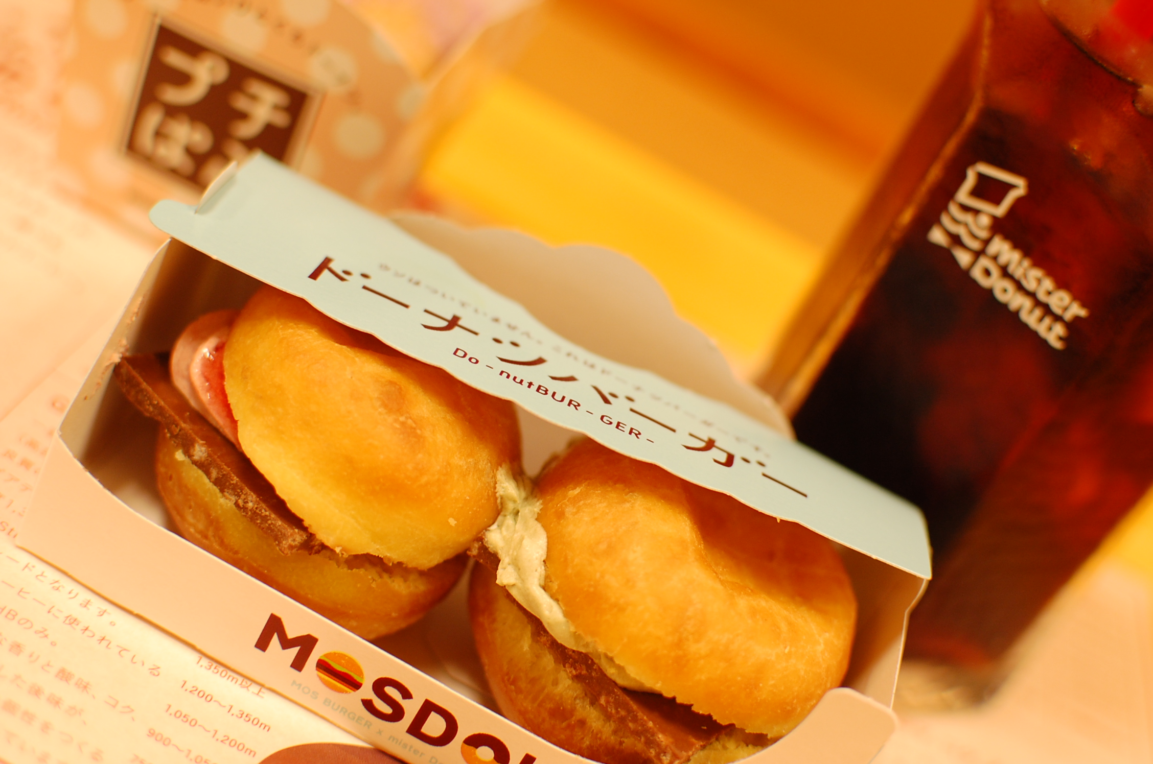 モスドで提供される「ドーナツバーガー」